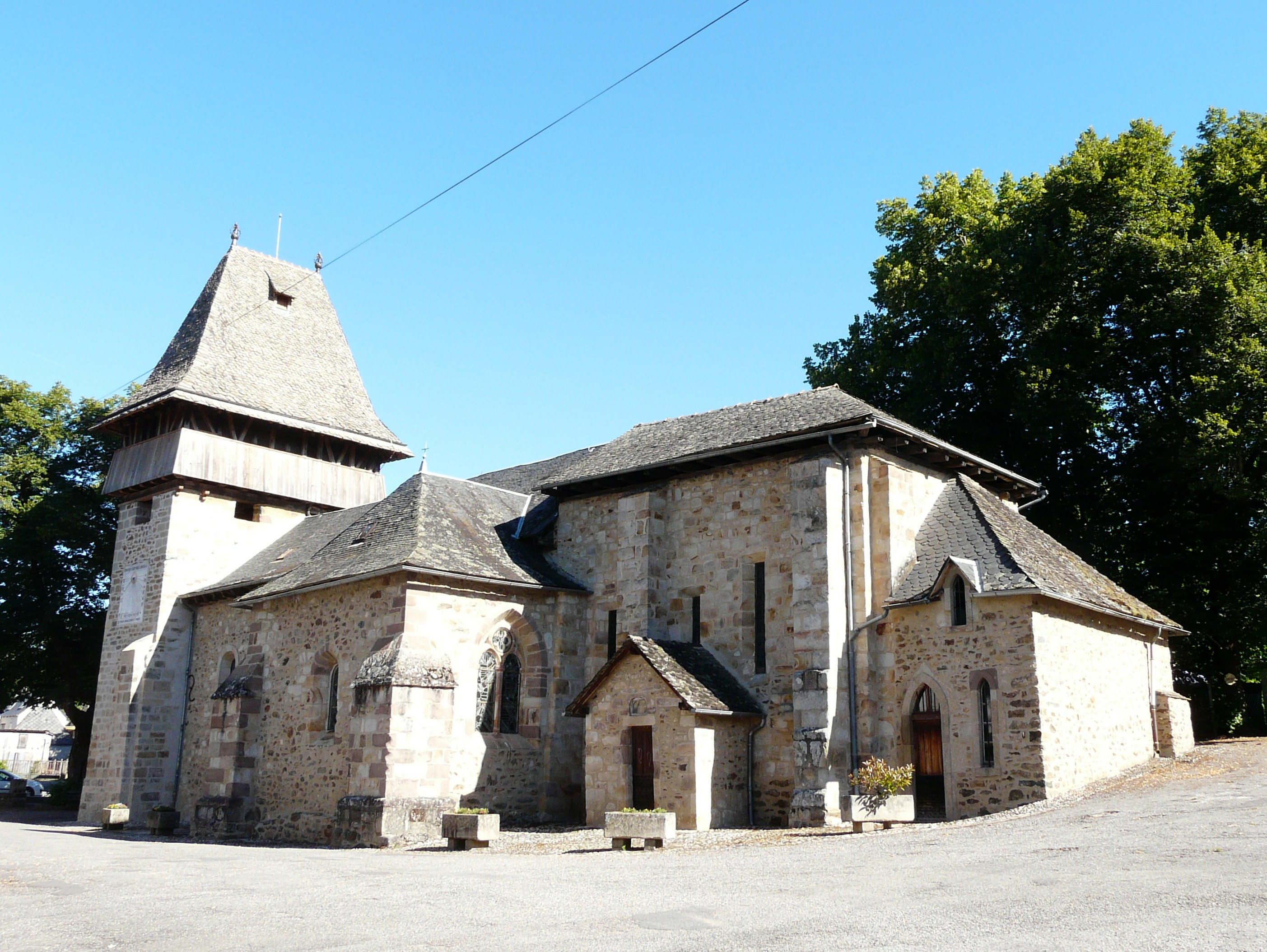 L'église de Saint-Chamant, Corrèze, France.